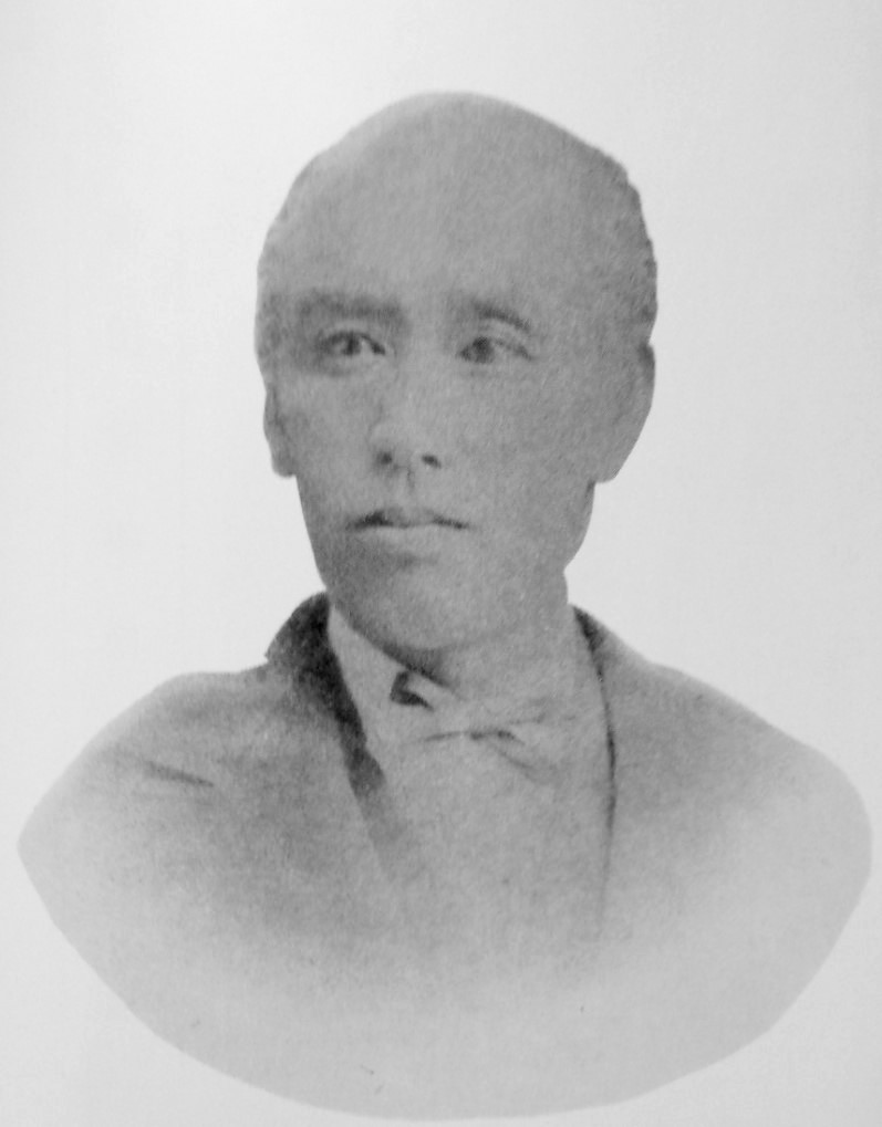 水野忠精の肖像写真。